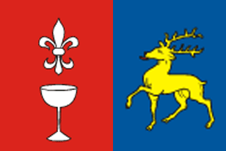 prapor obce